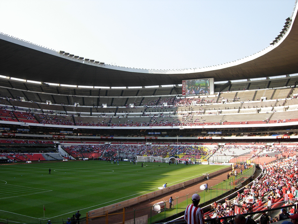 Estadio Azteca, February 17, 2007